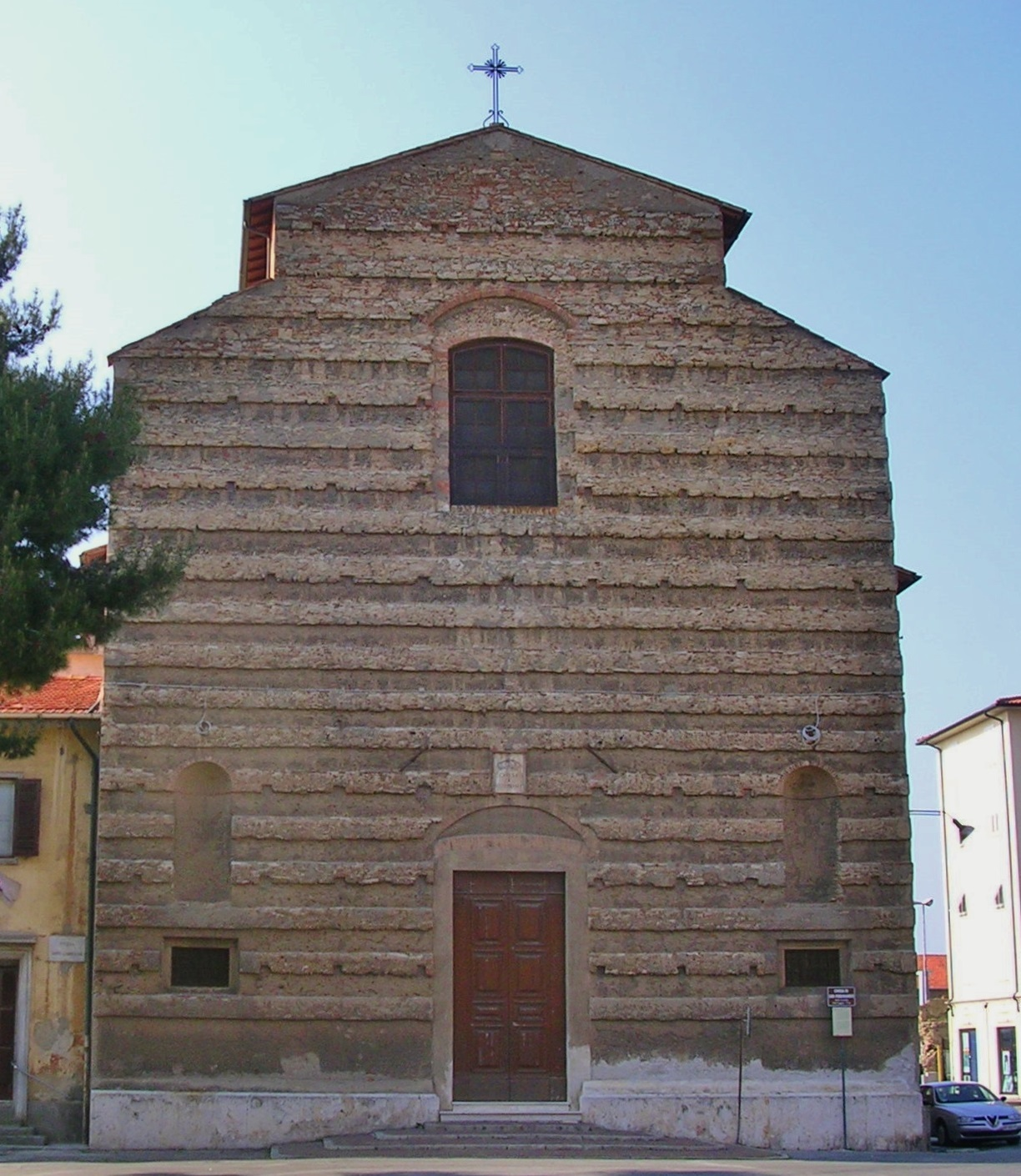 Livorno: la chiesa di San Ferdinando (XVIII secolo) nel quartiere della Venezia Nuova.